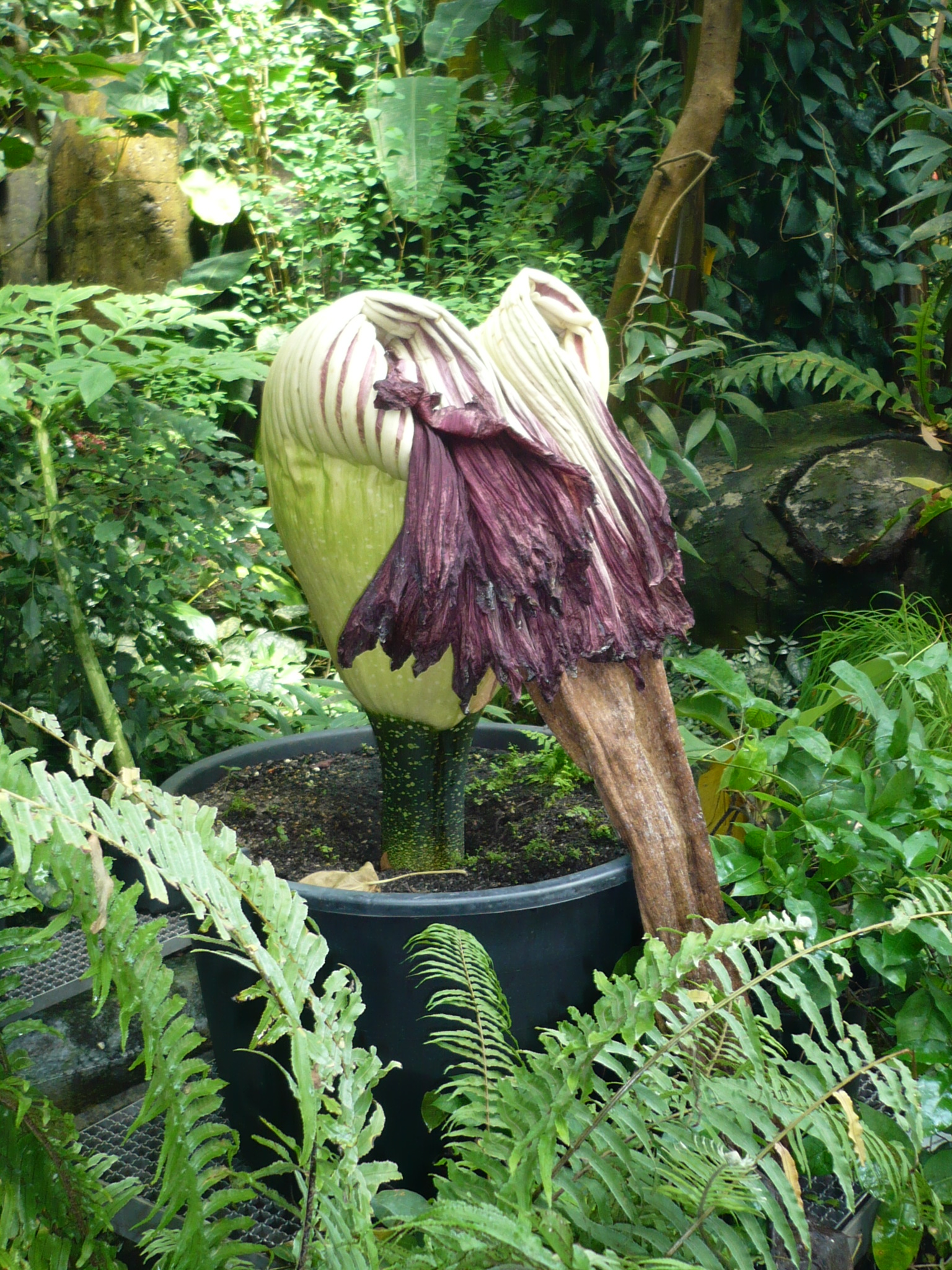 Titanwurz eine Woche nach der Blüte in Bayreuth